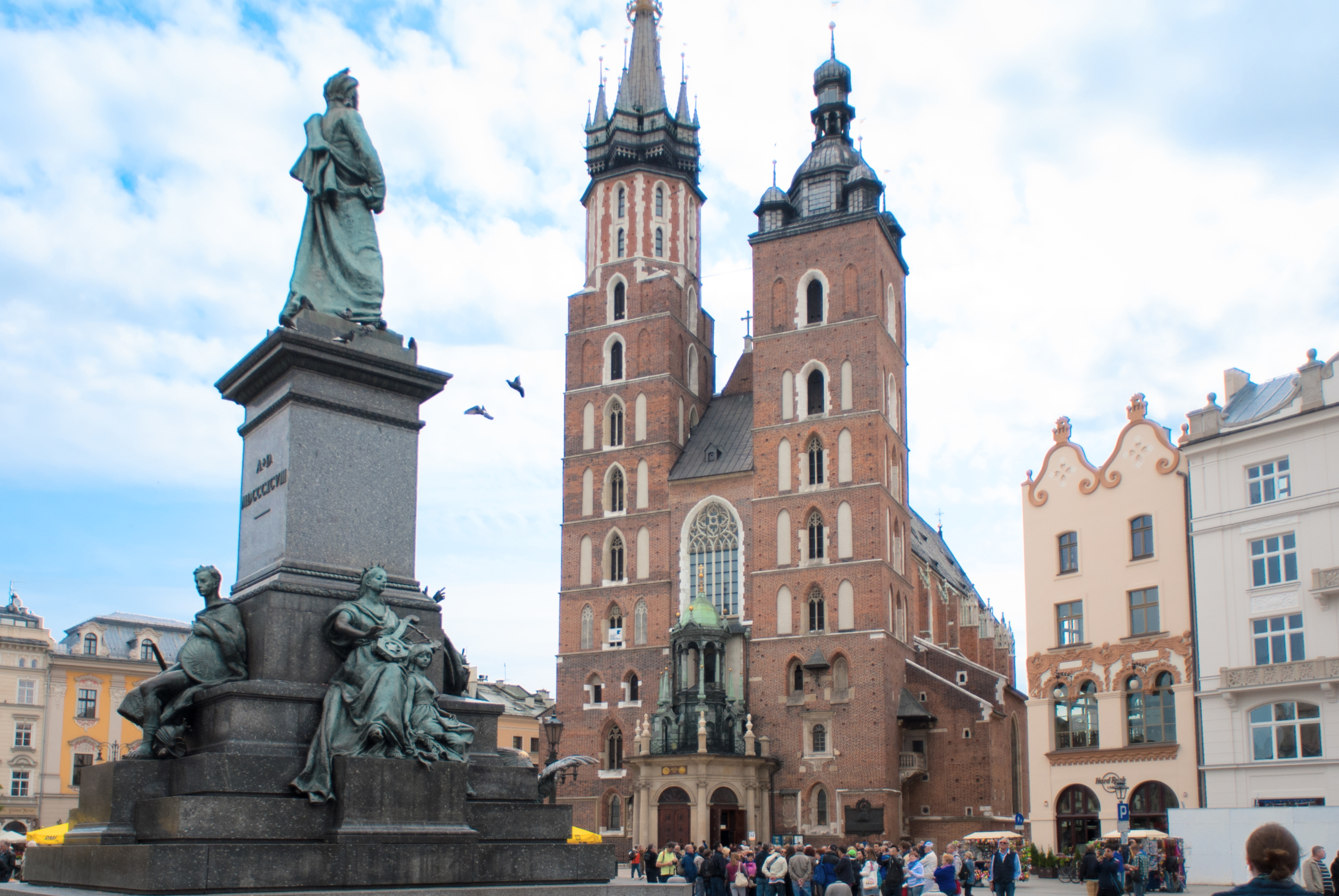 Kościół Mariacki w Krakowie English | Polski | +/−